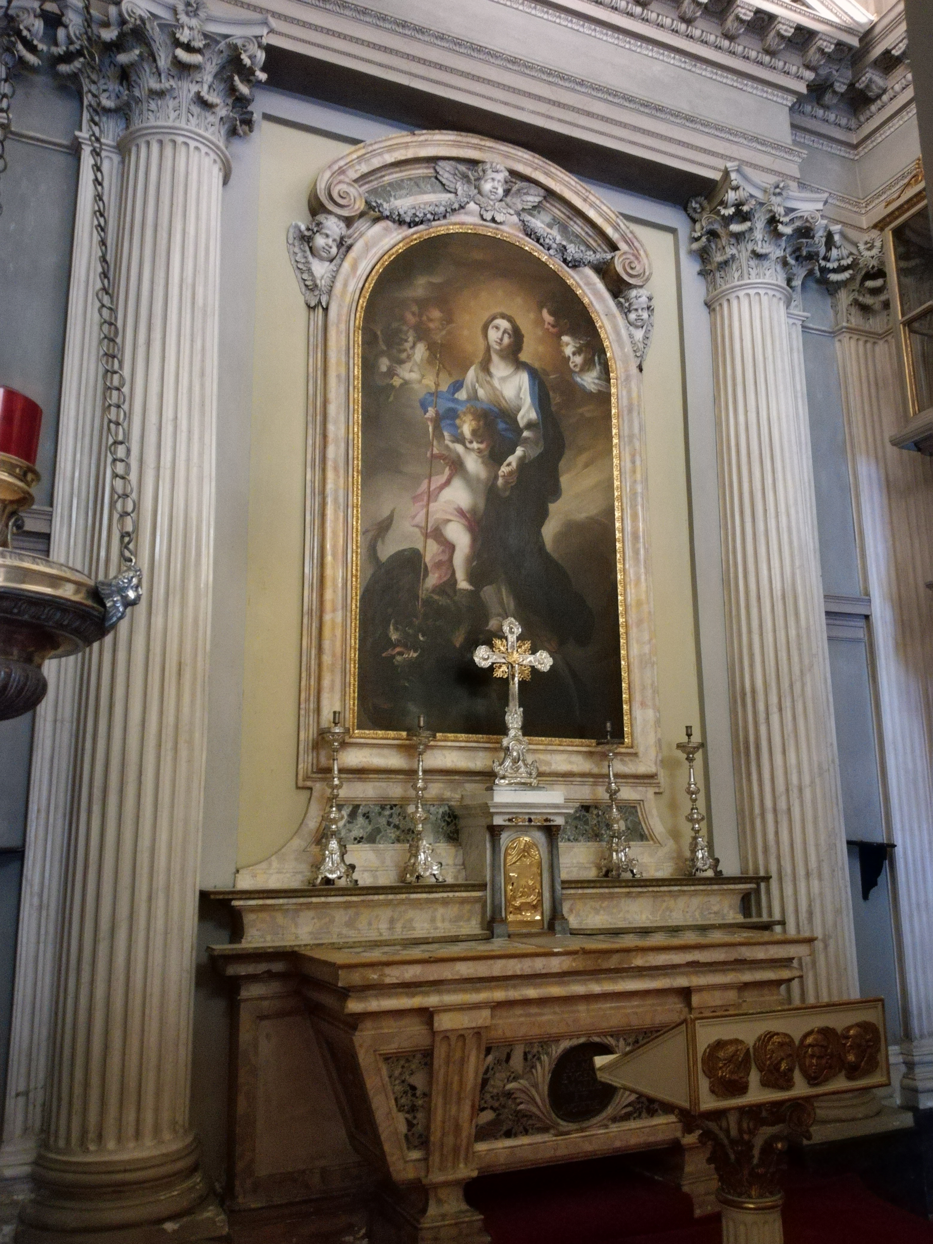 villa reale di monza, cappella